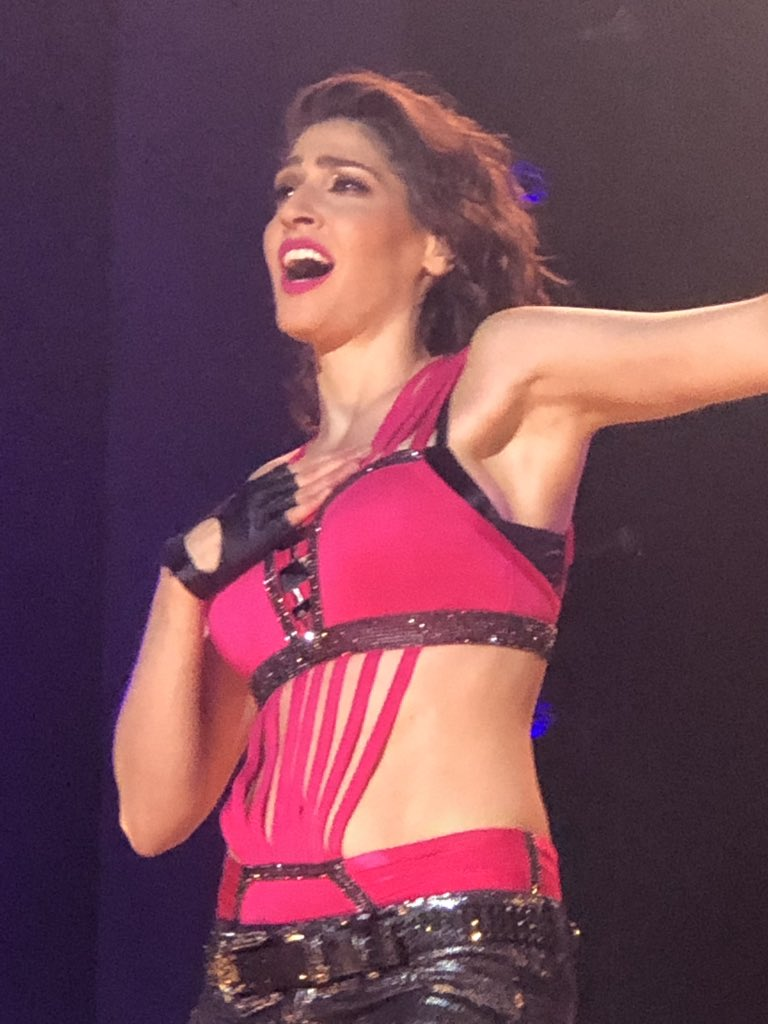 Ha*Ash Auditorio Nacional México 11 de Noviembre de 2018